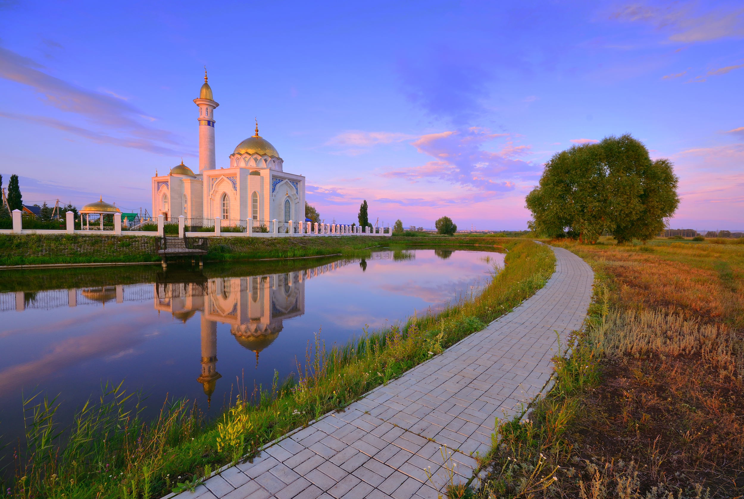 Мечеть "Суфия". Стерлитамакский район